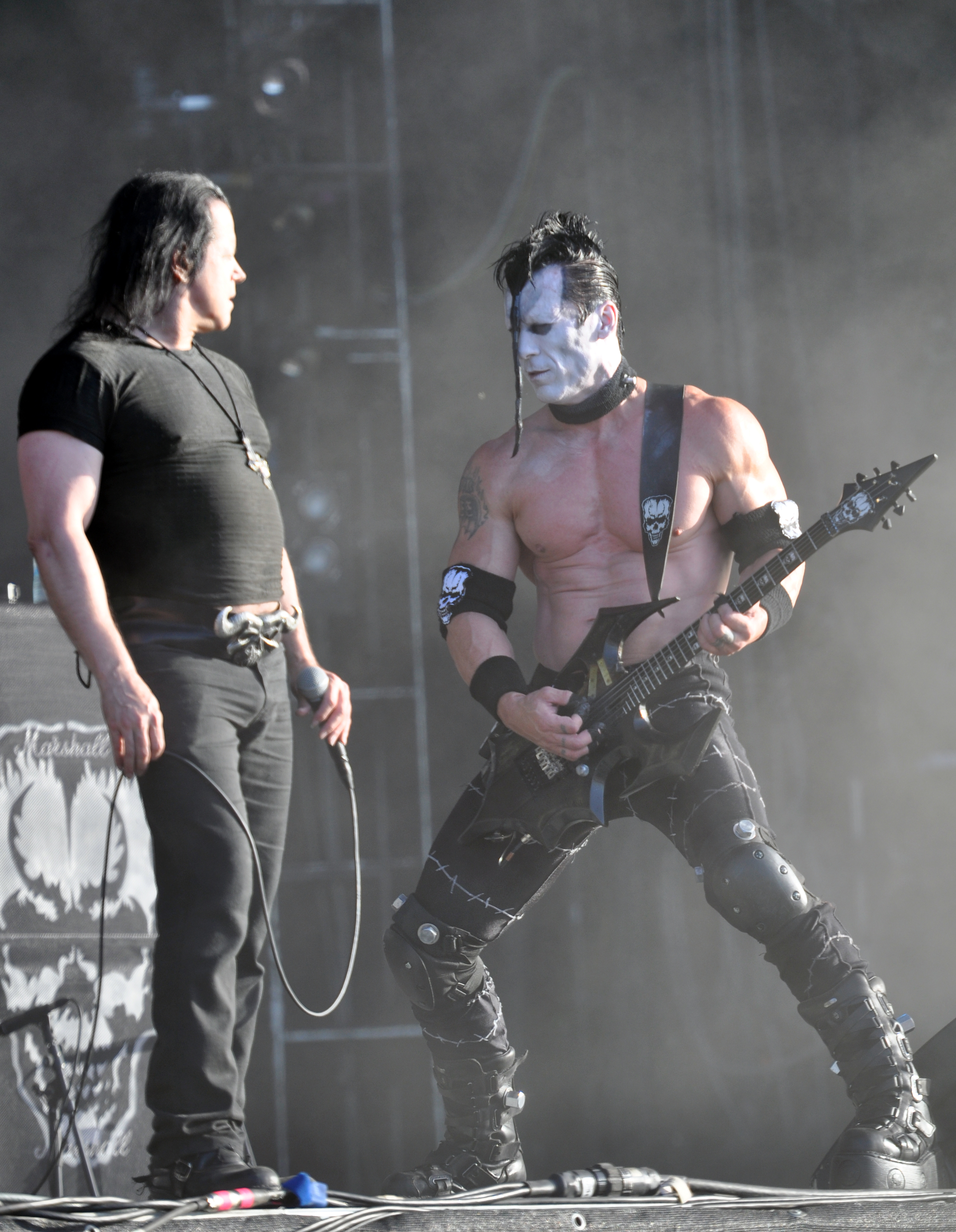 Danzig at Wacken Open Air 2013